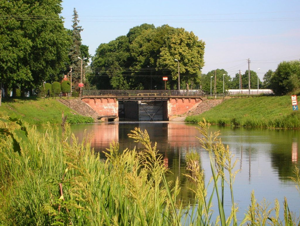 Śluza Prądy w Bydgoszczy